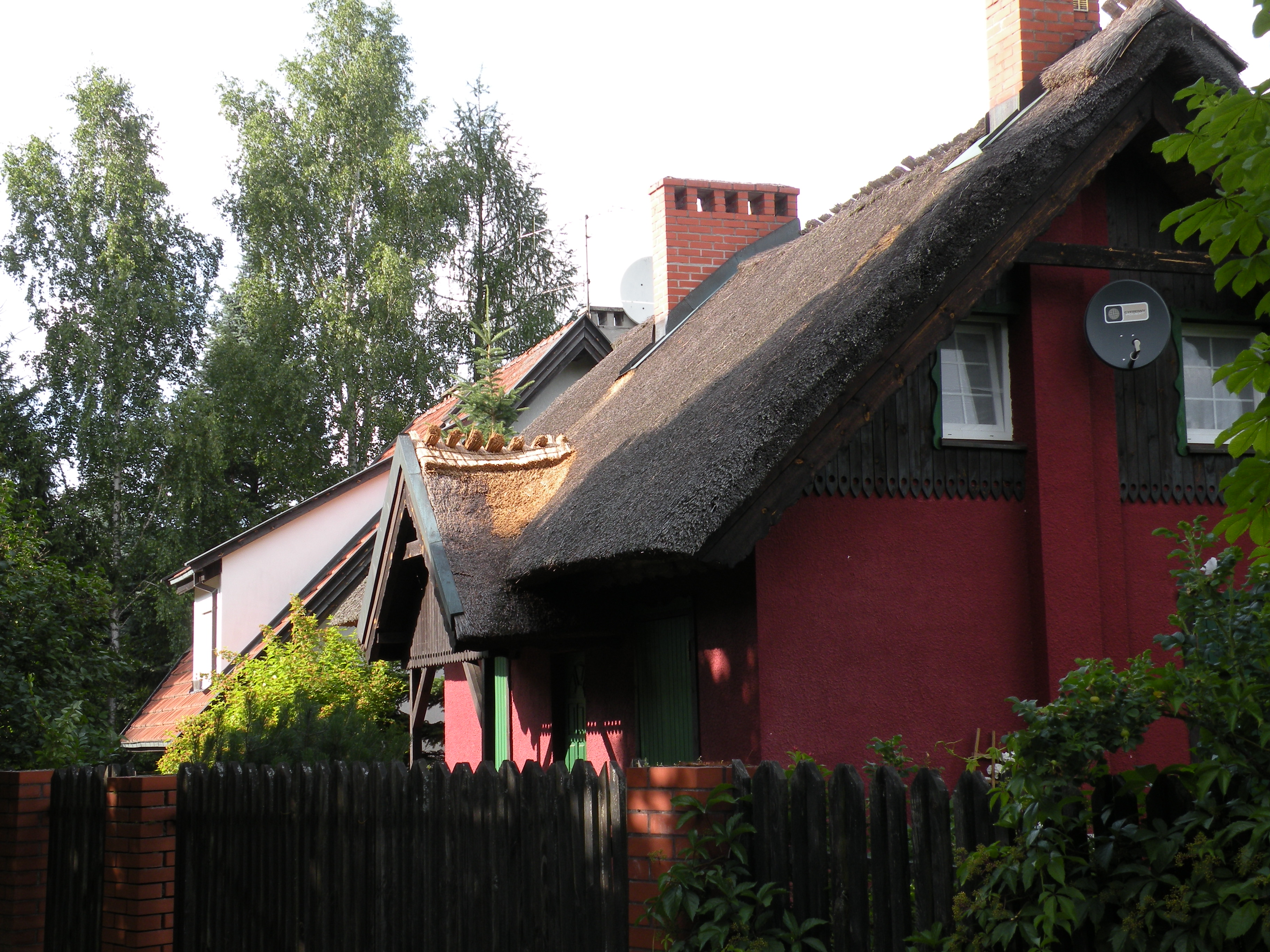 Łajs koło Butryn